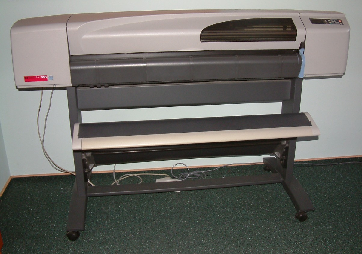 fot.wikipedysta:radomil